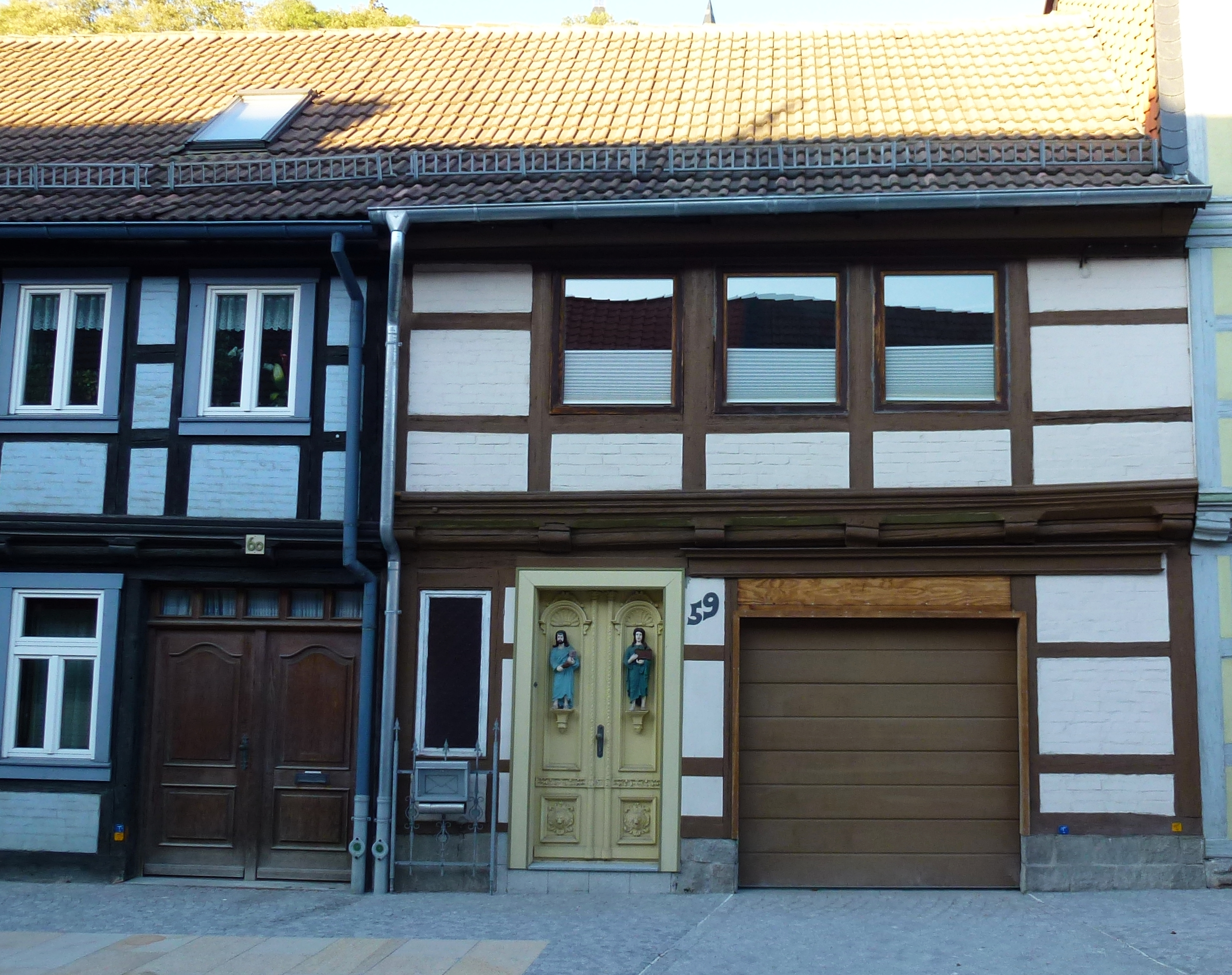 Fachwerkhaus in der Nöschenröder Straße 59 in Wernigerode.